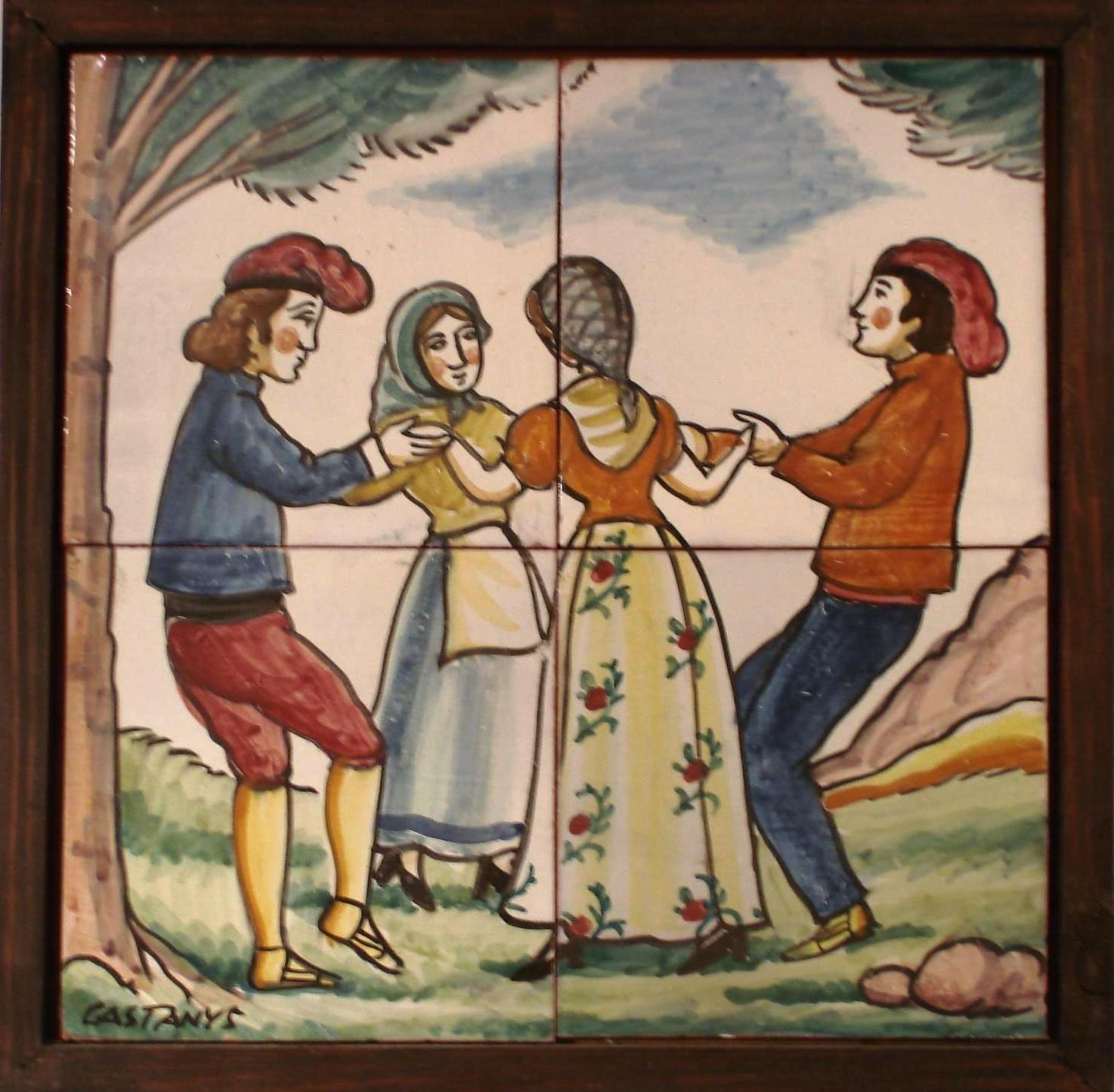 Ceramic tile / people dancing Sardana